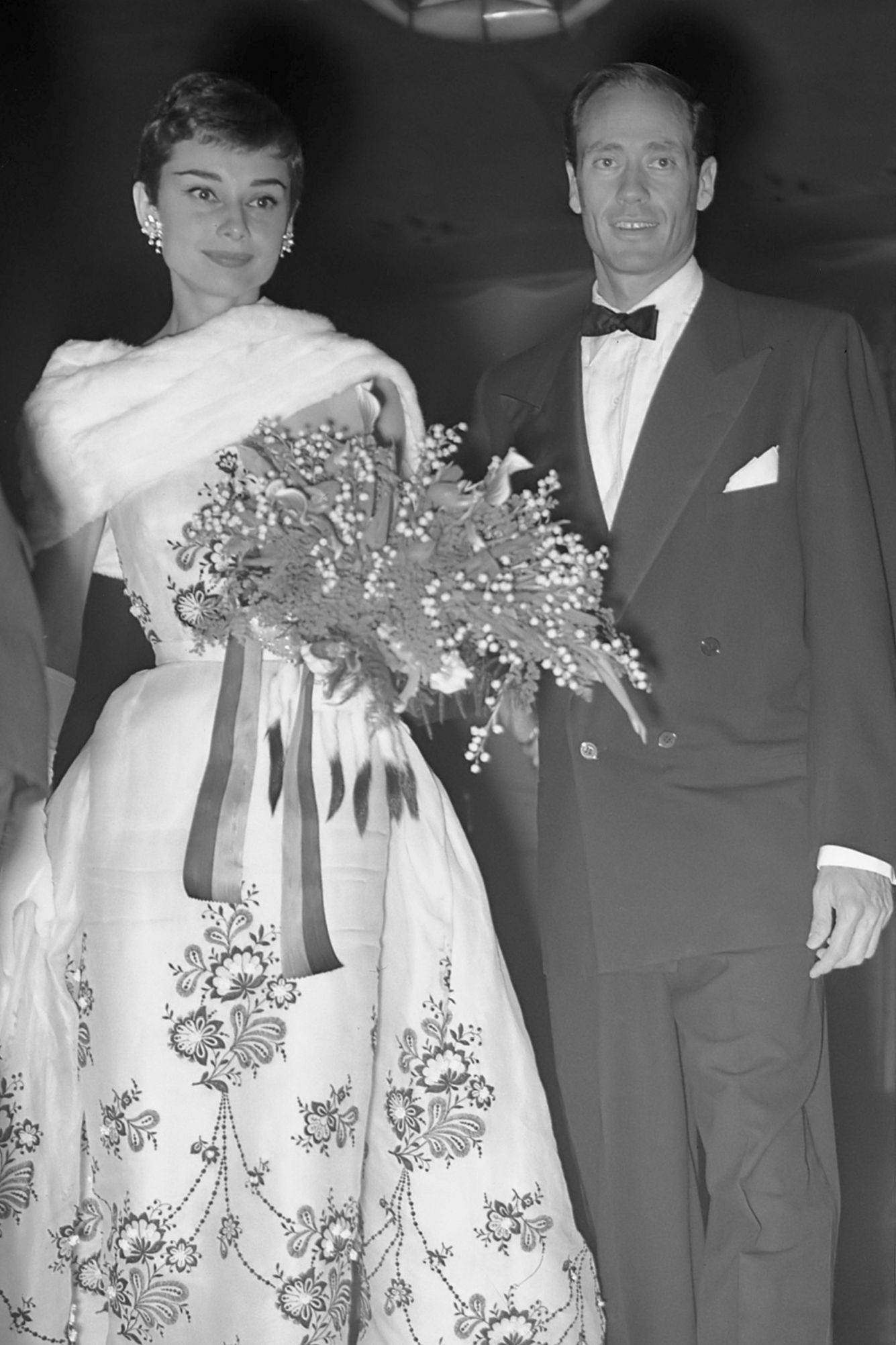 Audrey Hepburn met echtgenoot Mel Ferrer tijdens feestavond film Tuschinsky 2 november 1954